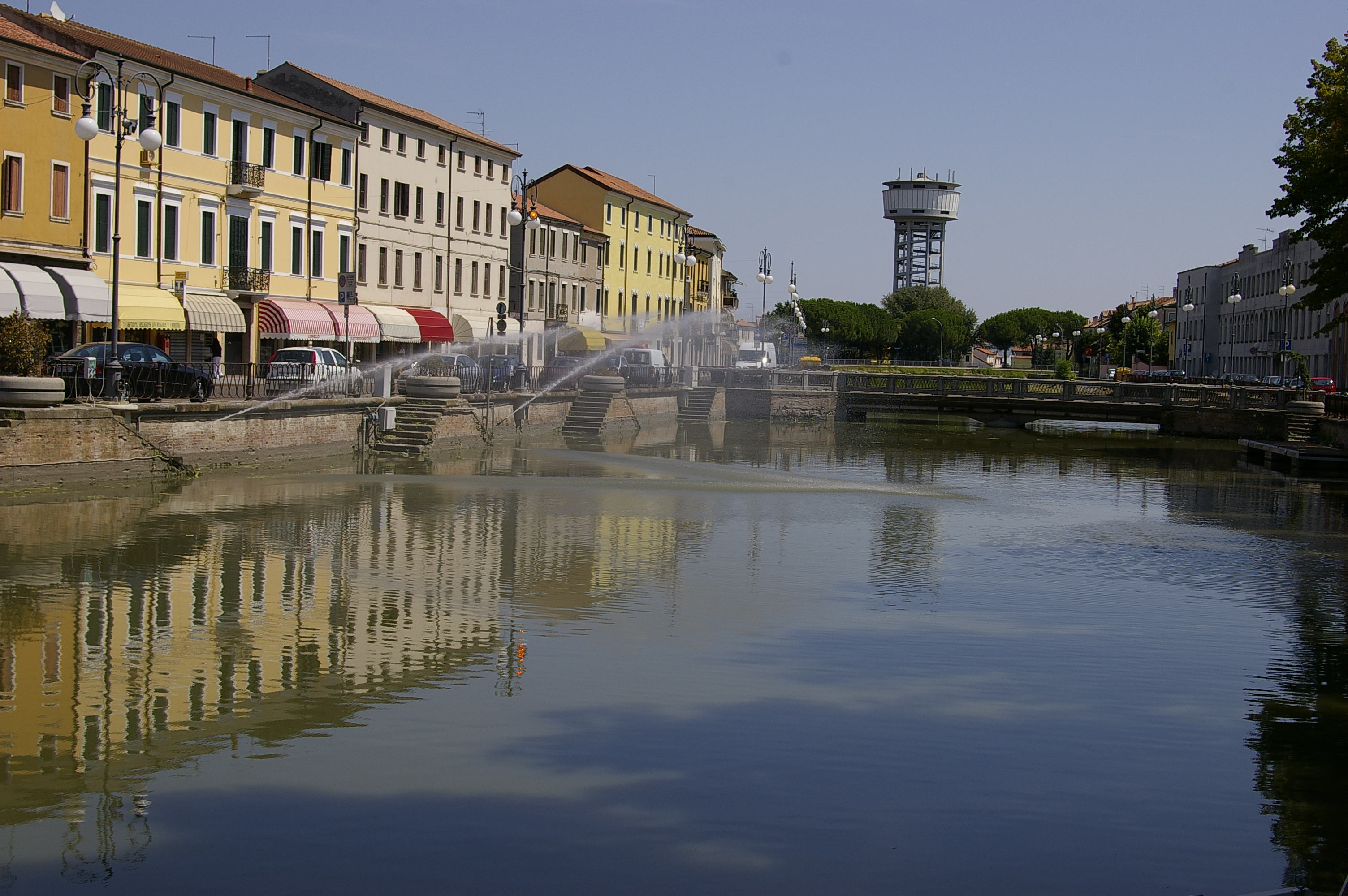 Caratteristiche palazzine che danno sul Canal Bianco, fiume che attraversa Adria (provincia di Rovigo, Veneto